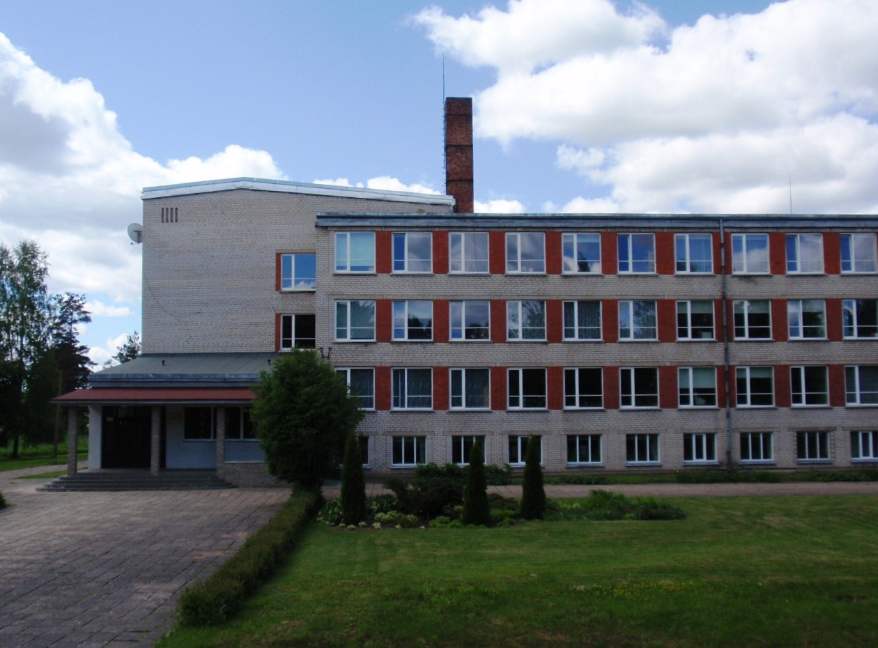 Valkas pamatskola